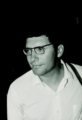 Foto di Yuri Vasilevich Prokhorov